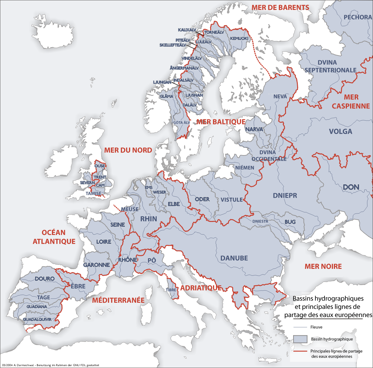 Traduction de Image:Europäische_Wasserscheiden.png